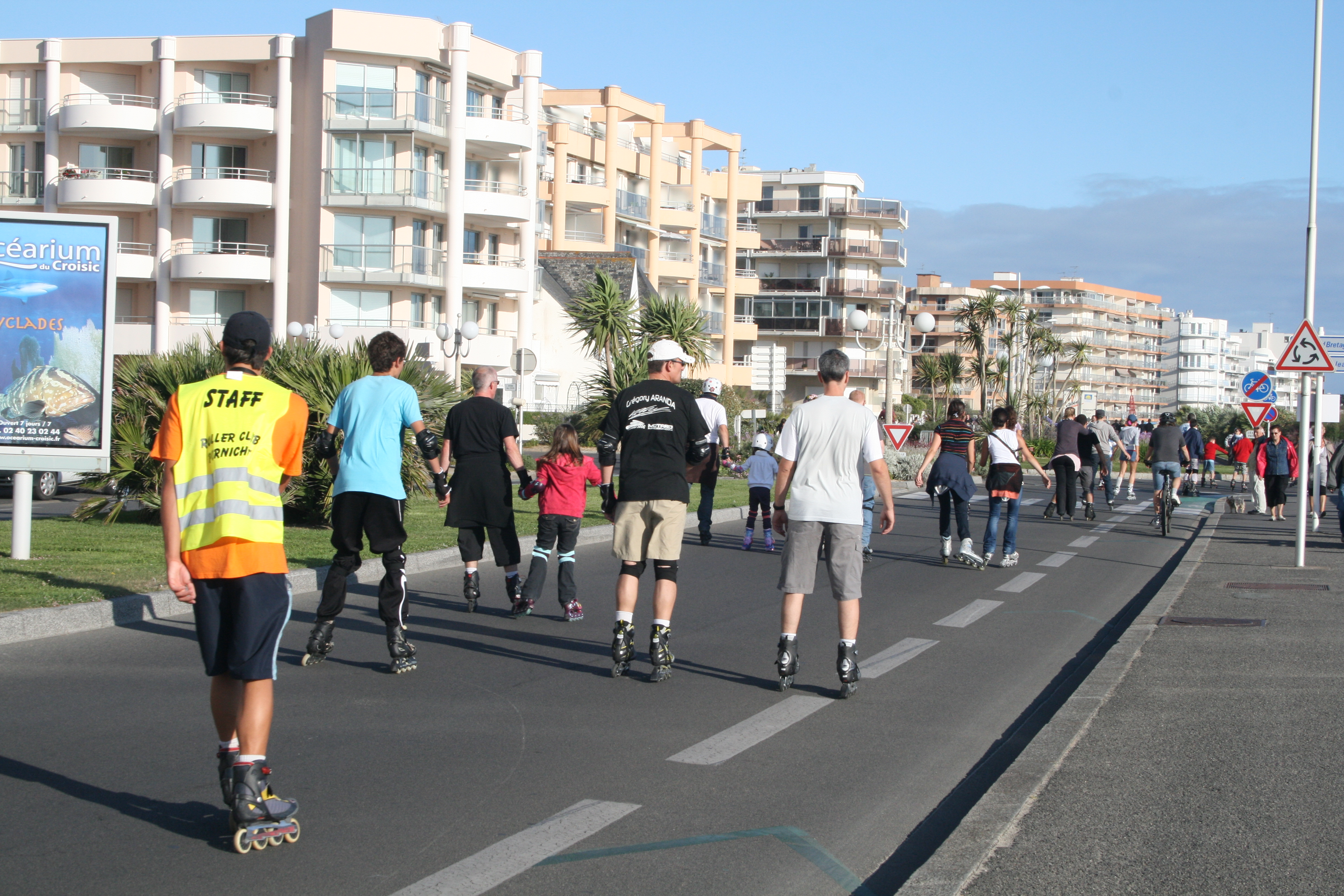 Après-midi roller dans les rues de Pornichet